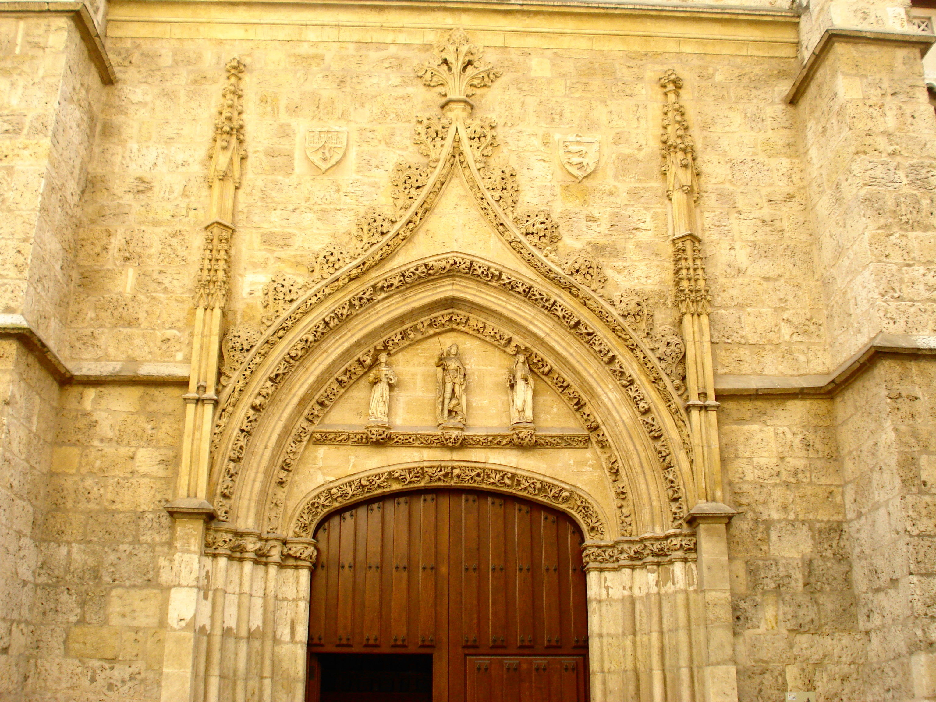 Arco conopial del Convento de las Clarisas en la capital de Palencia